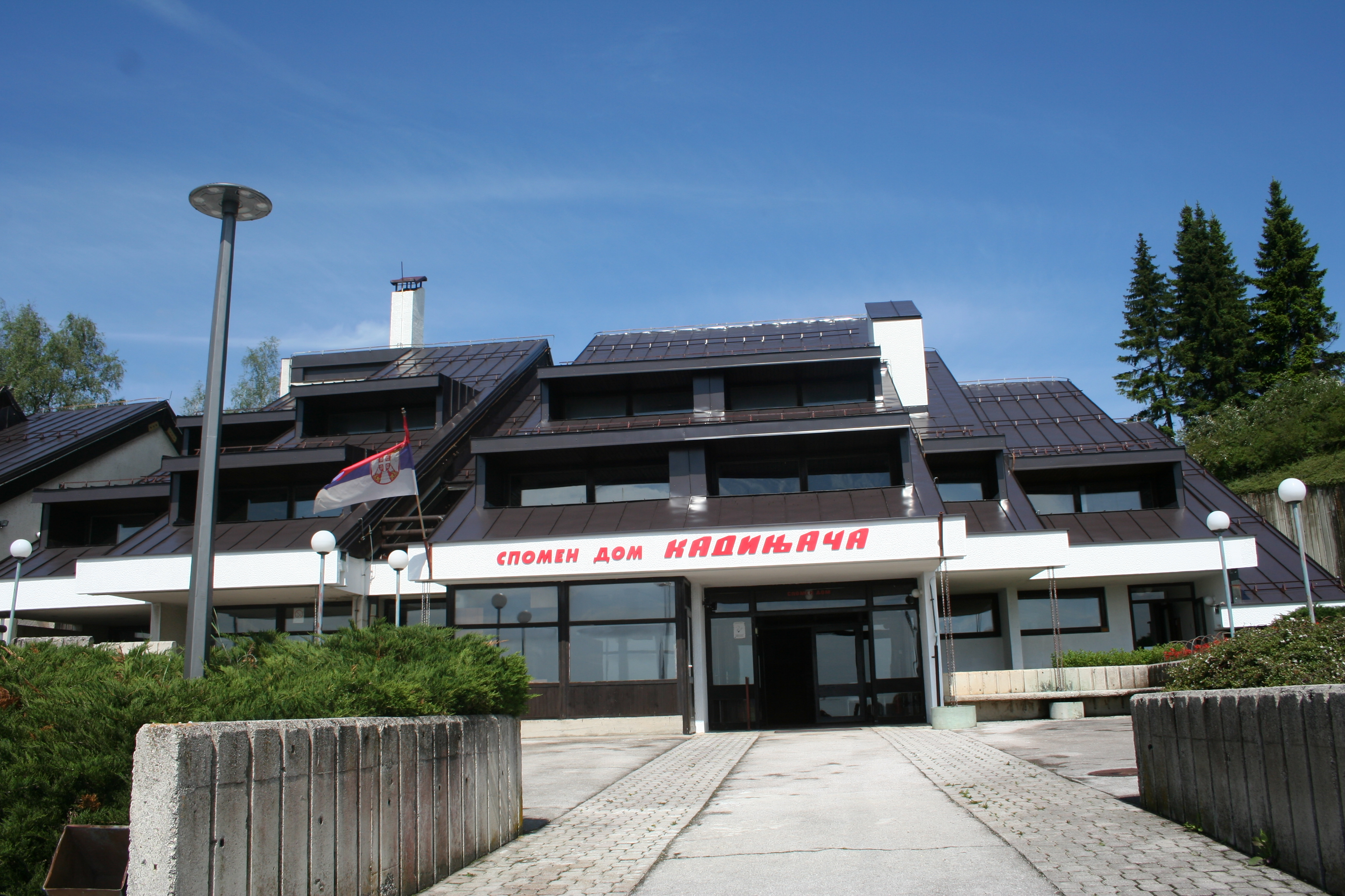 Spomen kompleks Kadinjača